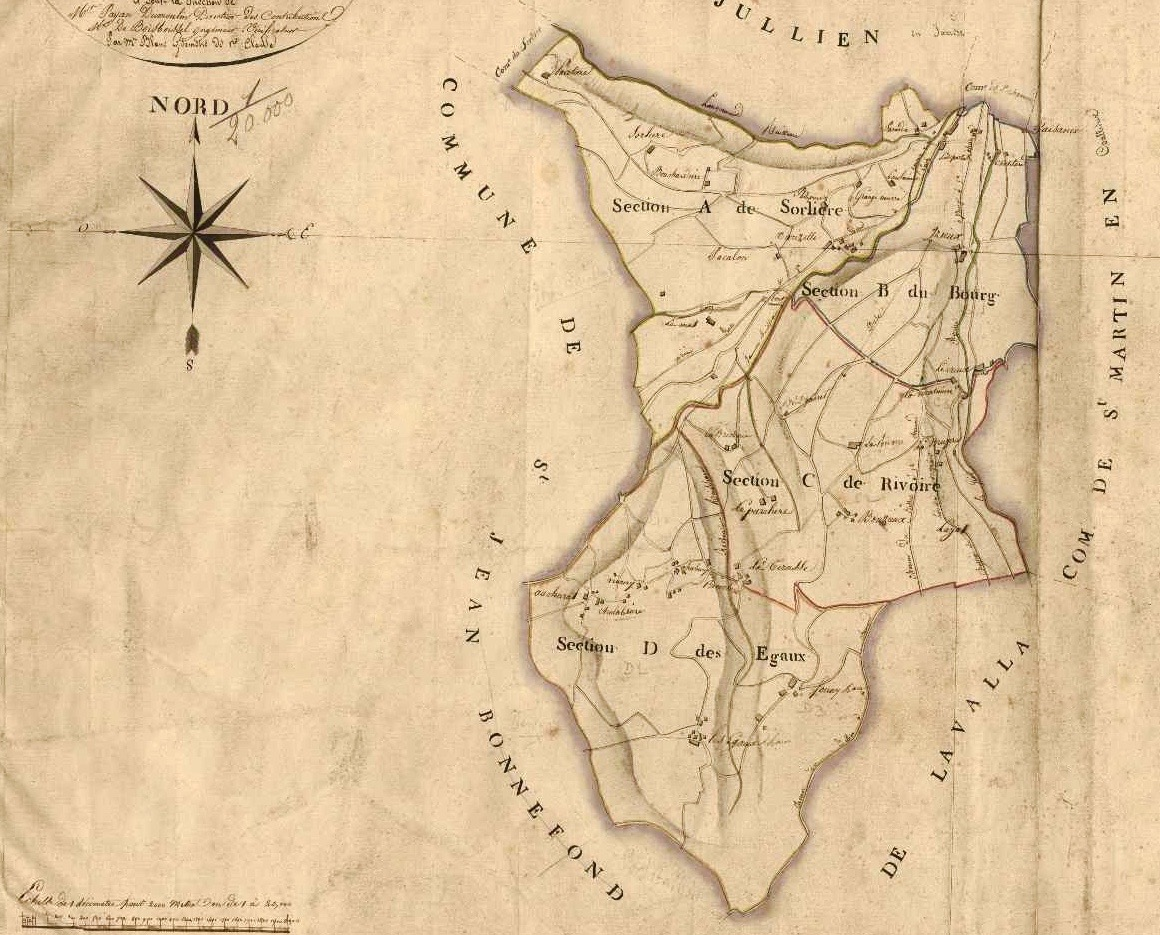 Extrait du cadastre napoléonien, 1812, commune d'Izieux (Loire), tableau d'assemblage : plan levé par Blanc à l'échelle 1:20000. Source : archives départementales de la Loire, en ligne.